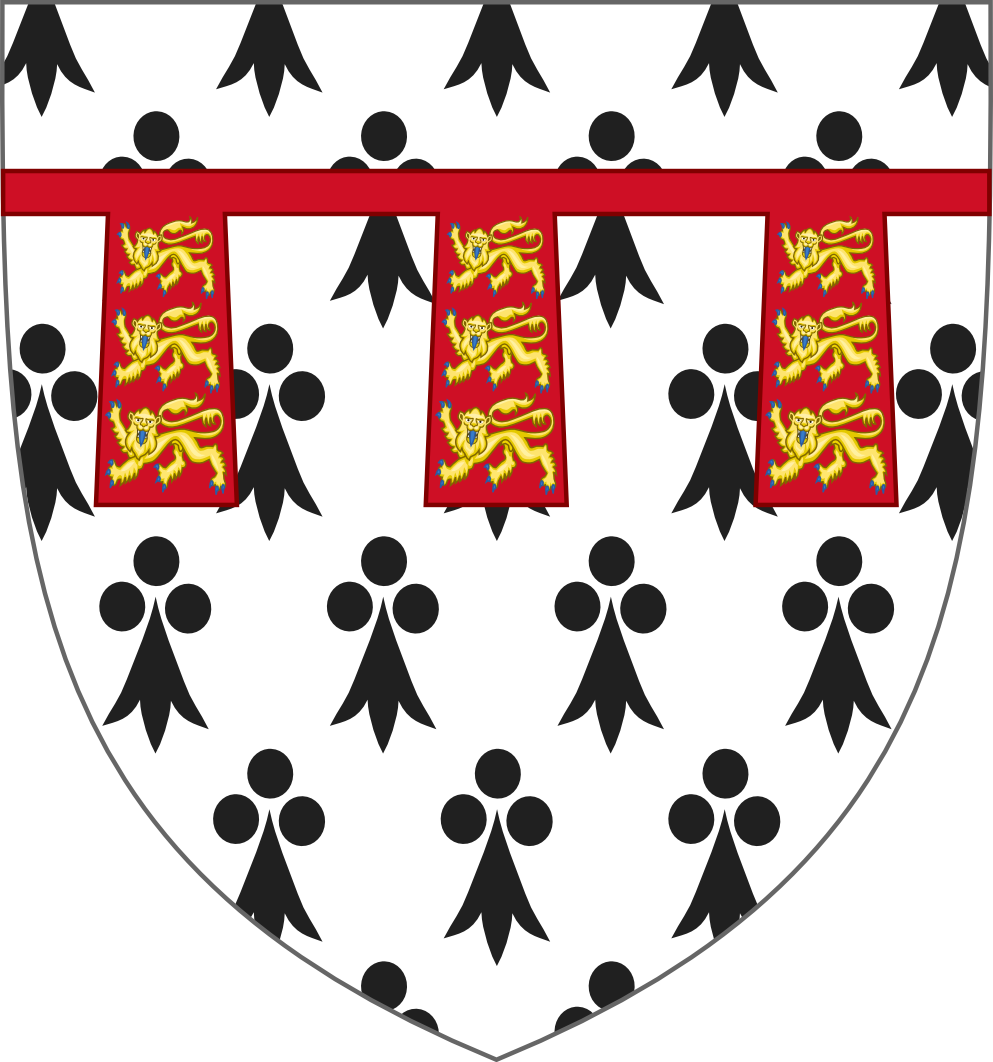 Armoiries de Arthur de Richemont, compagnon de Jeanne